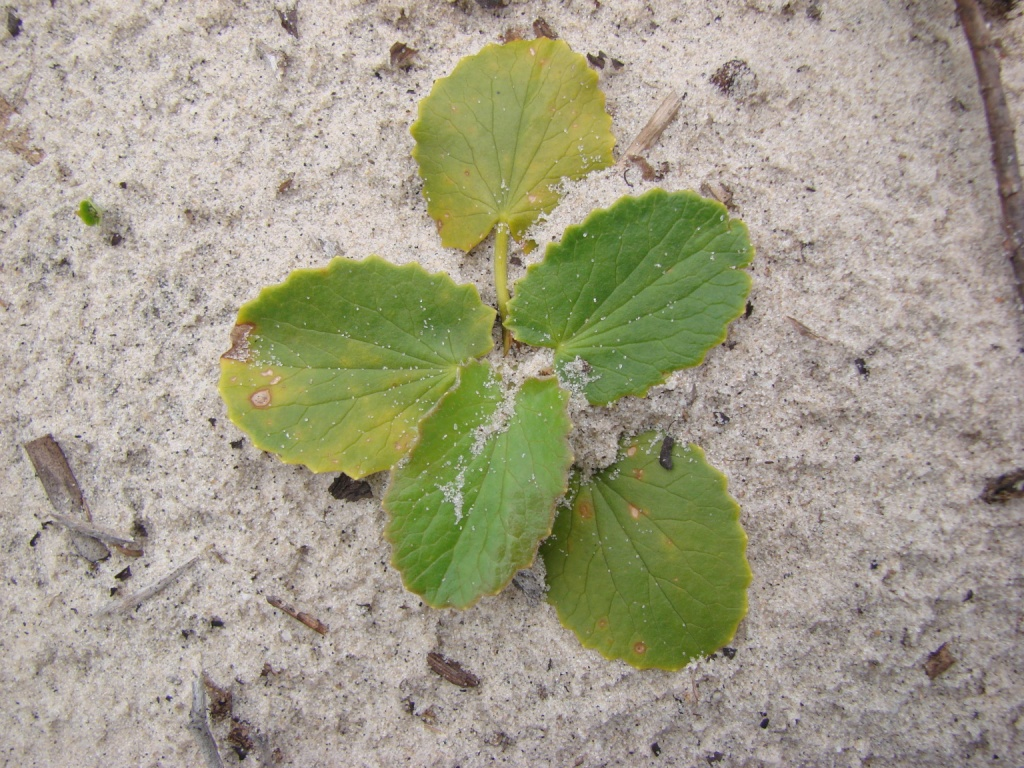 Centella asiatica - APIACEAE - Praia do Mo�ambique - Florian�polis - SC - Brasil